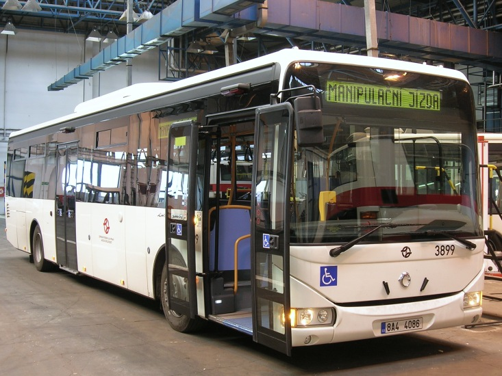 Crossway LE 12,8 pražského DP, který je upravený pro přepravu vozíčkářů.